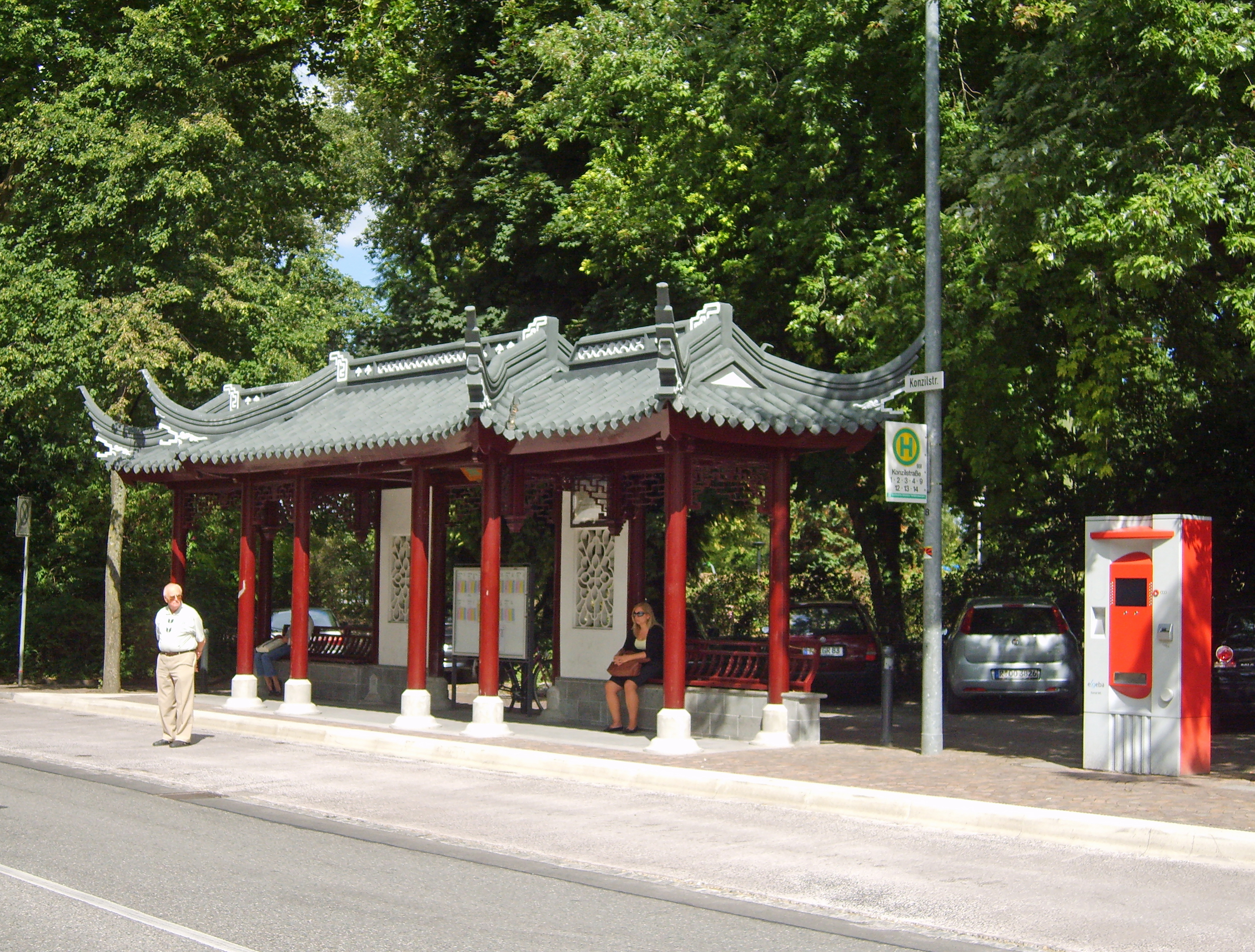 Konstanz. Bushaltestelle Konzilstraße. Geschenk der Partnerstadt Suzhou in China.